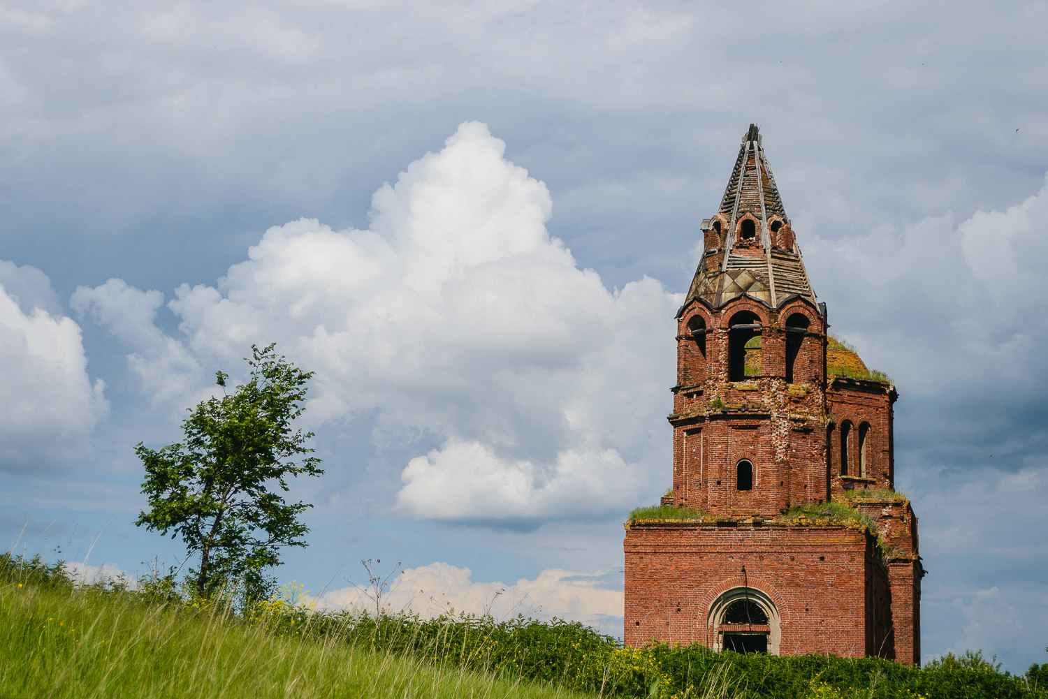 Сретенская церковь: Нижнекамск, Татарстан